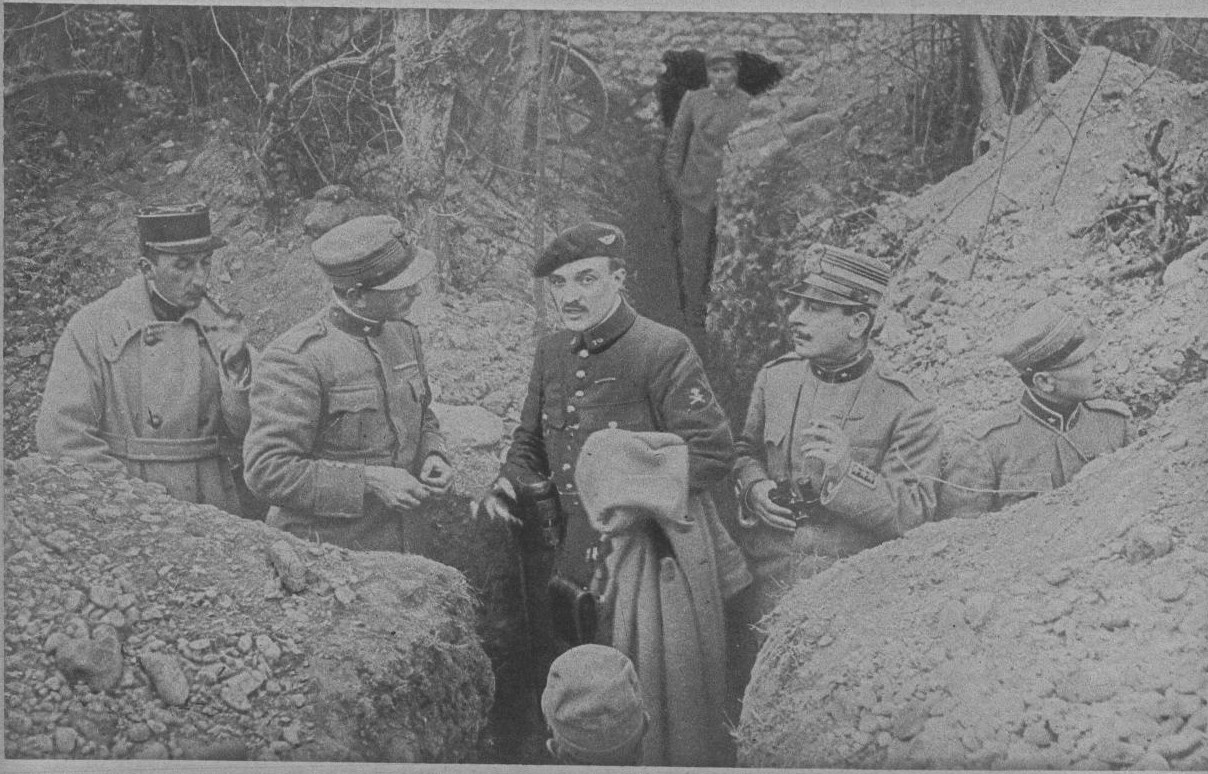 Collaboration de français et d'italiens sur le front de la Piave.